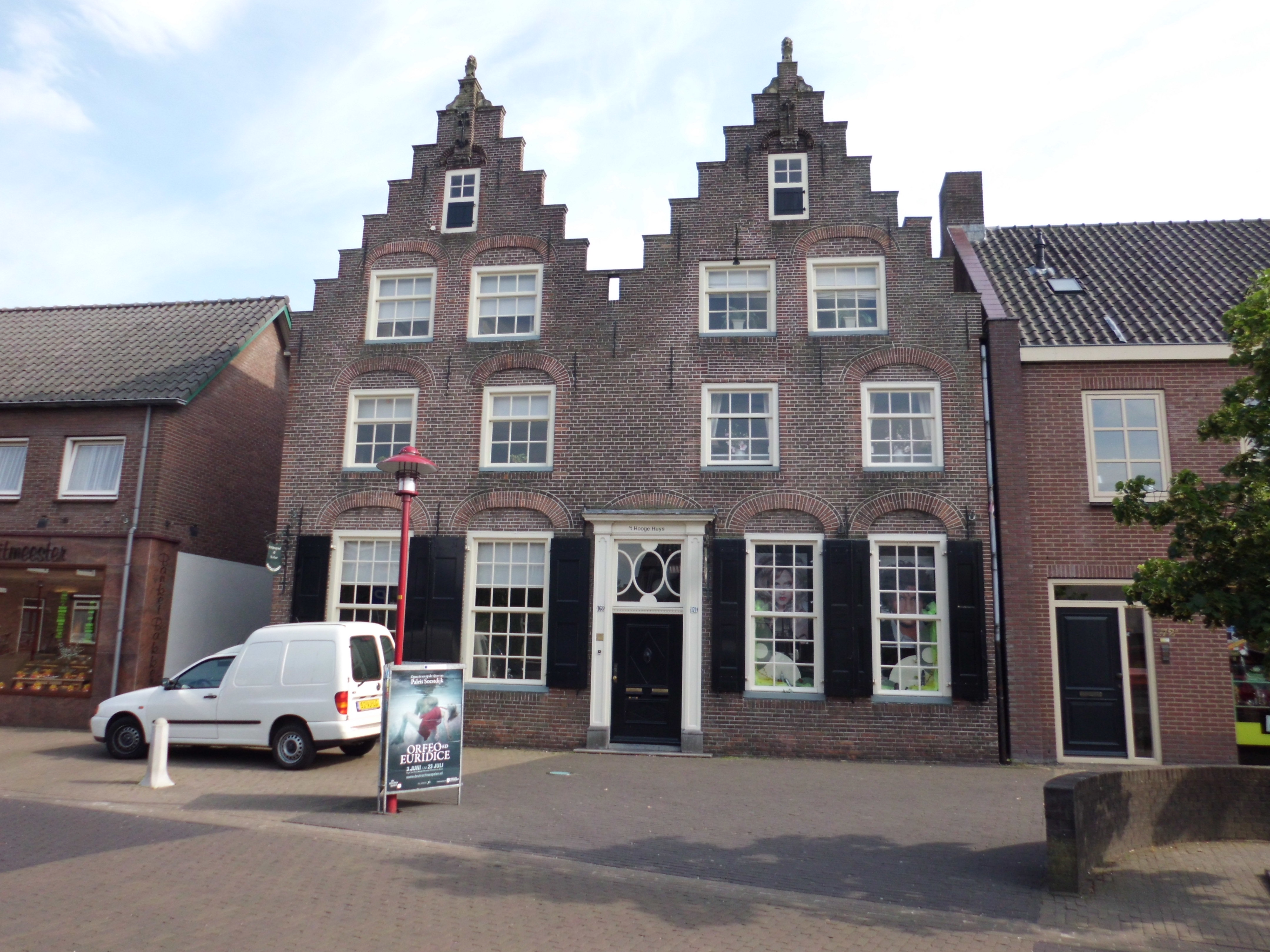 't Hooge Huys, Scherpenzeel